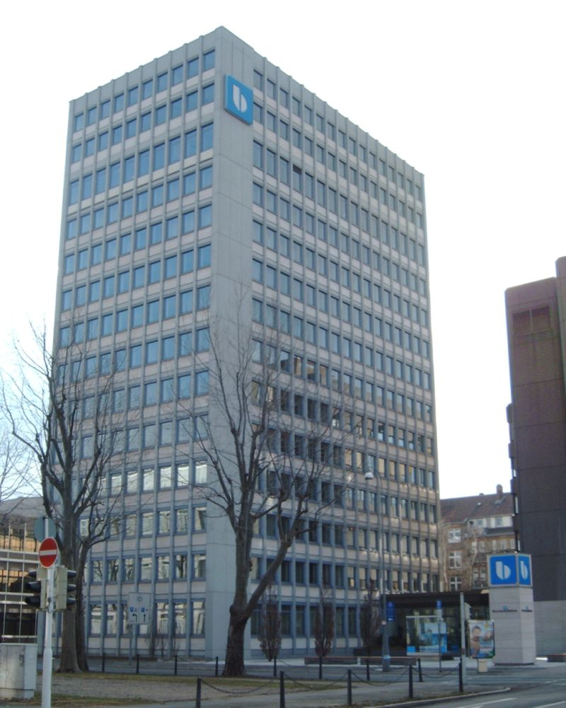 Bilfinger-Berger-Zentrale in Mannheim